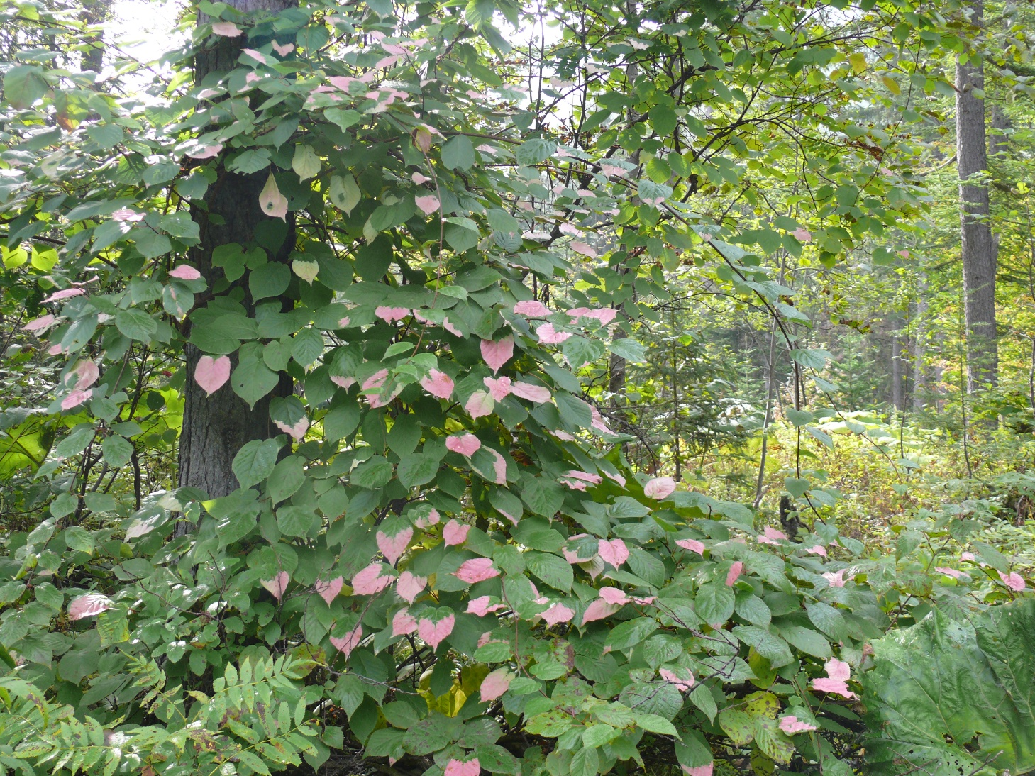 Актинидия коломикта, Сахалин